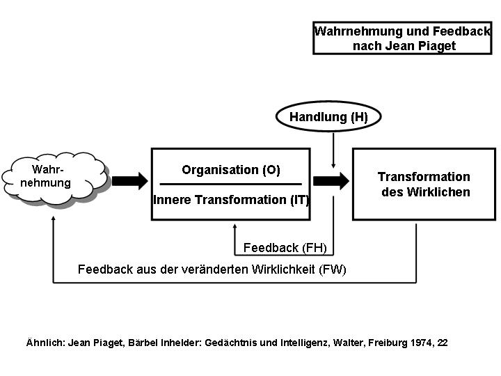 Illustration der Rückkoppelungen aus der Wahrnehmung nach Jean Piaget